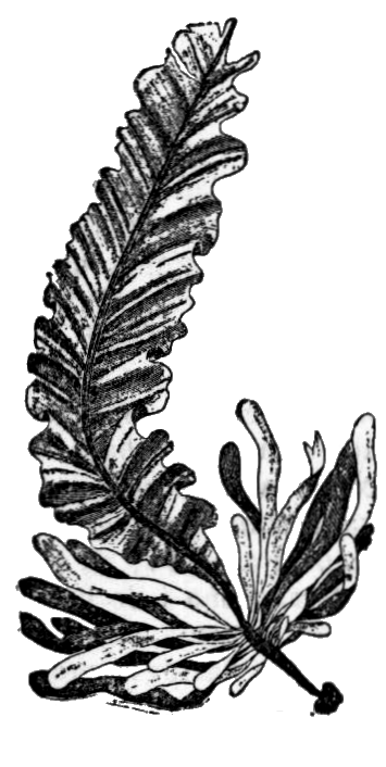 Alaria dolichorhachis = Alaria esculenta